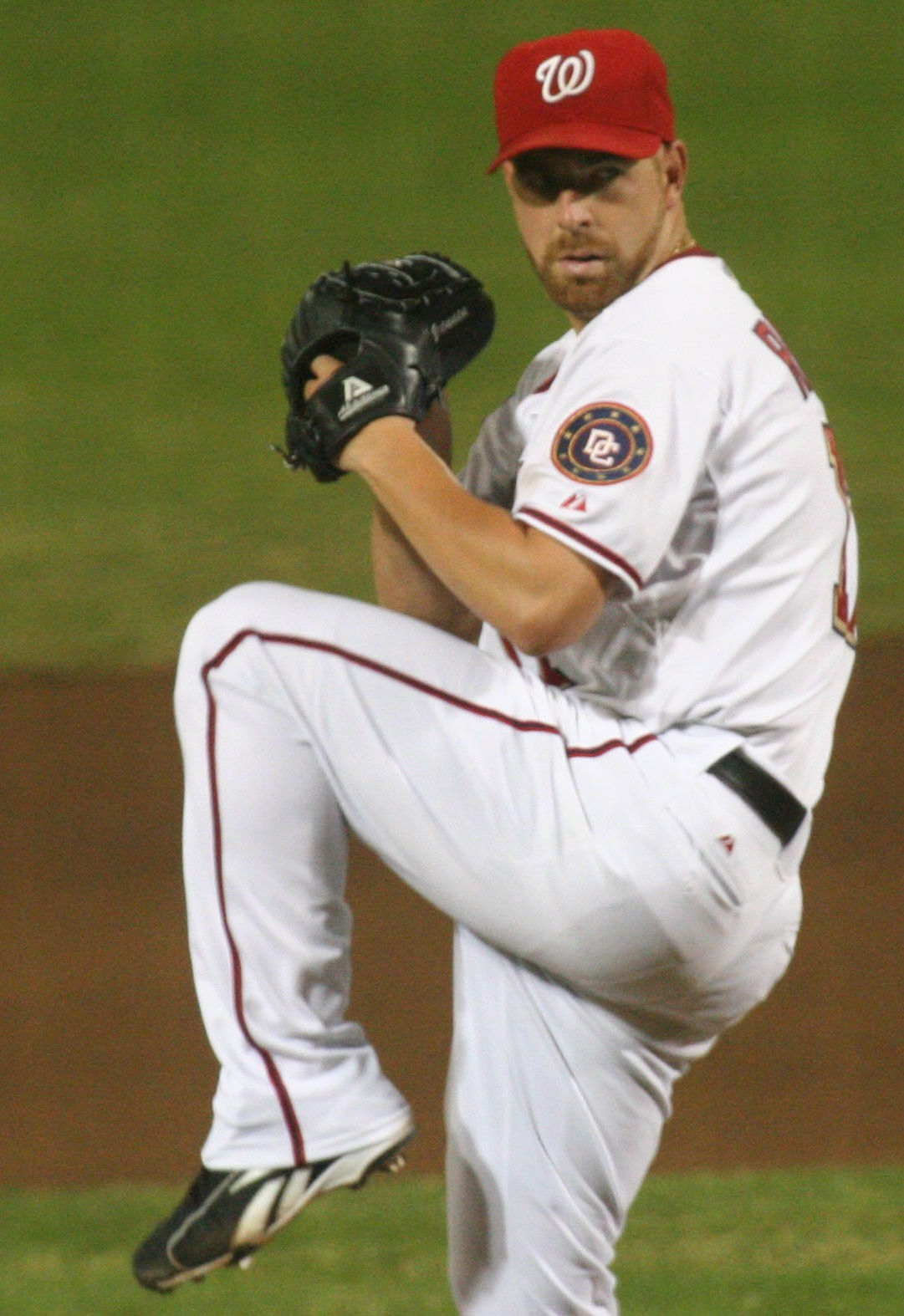 Tim Redding